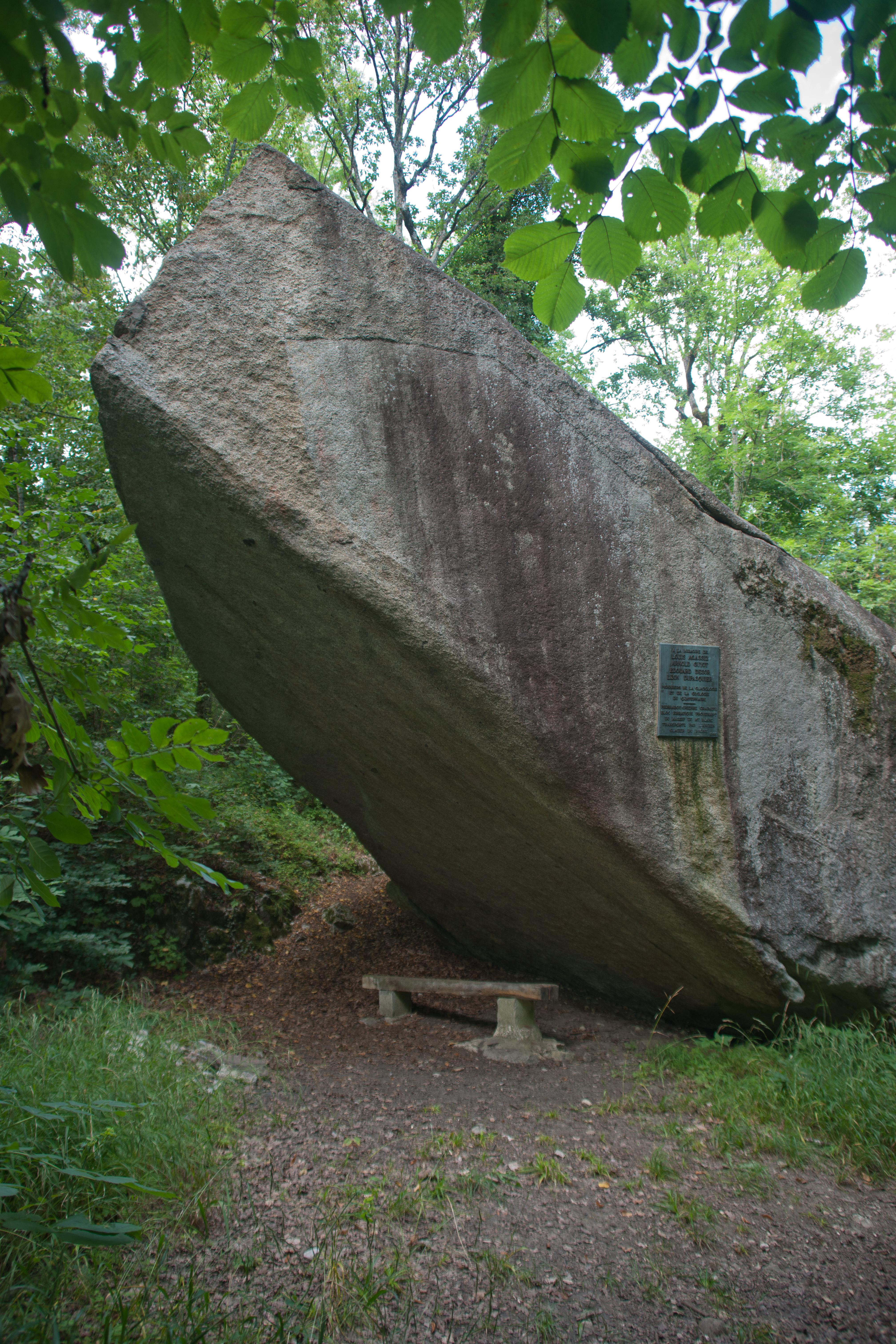 Pierrabot, bloc erratique au dessus de Neuchâtel